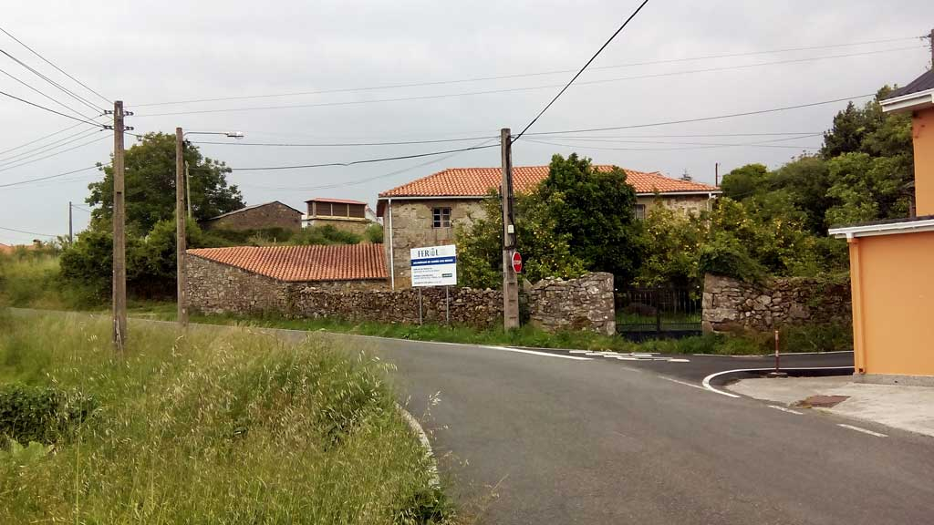 Vista de Cha, Esmelle.